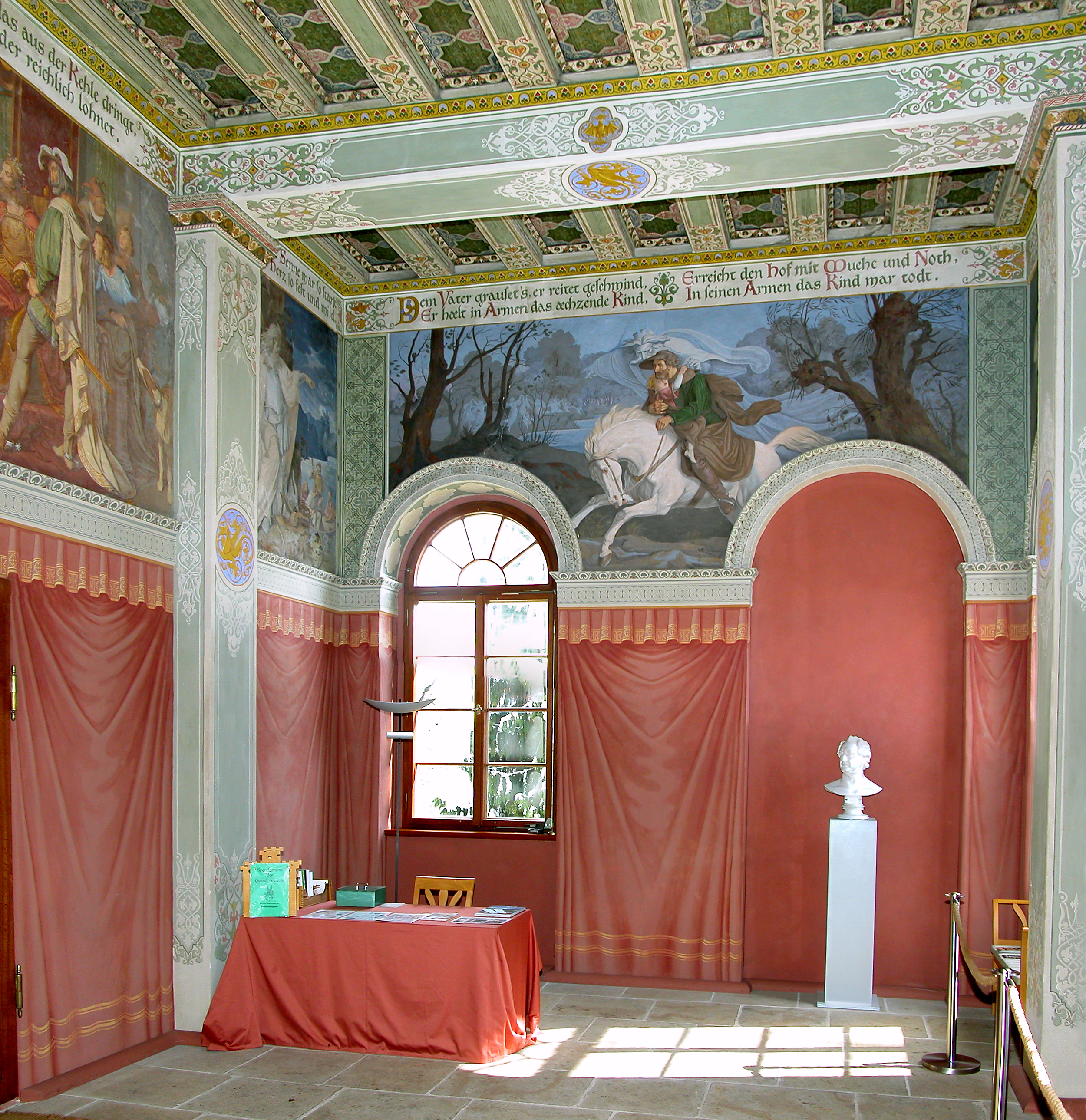 24.03.2008 01833 Elbersdorf (Dürrröhrsdorf-Dittersbach): Belvedere, Aussichtsturm (GMP: 51.028669,13.982667) Schöne Höhe (1830-1832 von J. Türmer). Bauherr war der Goetheverehrer Johann Gottlob von Quandt. Den Gartensaal im Erdgeschoss ließ Quandt 1836 bis 1838 von Carl Peschel mit Wandbildern zu Balladen des Weimarer Dichters ausmalen, hier "Erlkönig". [DSCN32029-32030.TIF]20080324035MDR.JPG(c)Blobelt